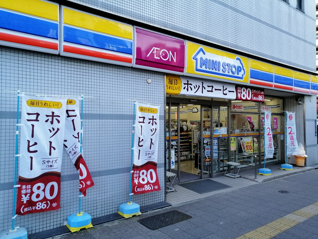 MINI STOP, Kanayama, Naogya